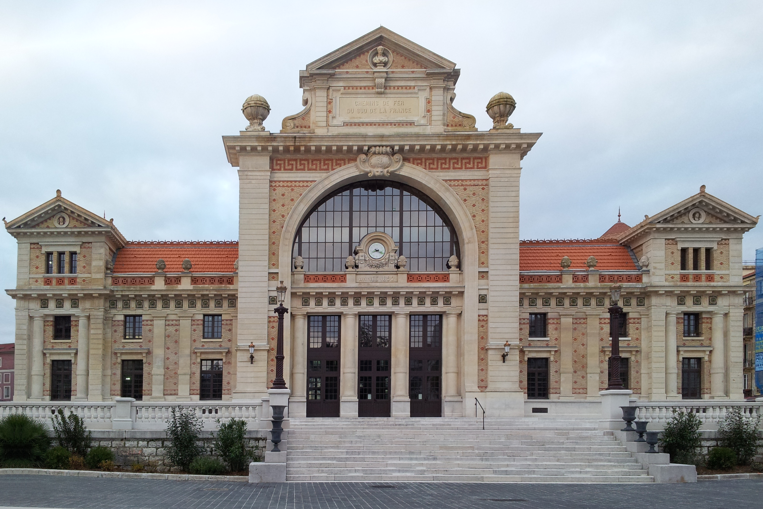 Ancienne Gare des Chemins de Fer de Provence à Nice, rénovée à l'identique et transformée en bibliothèque Raoul Mille.